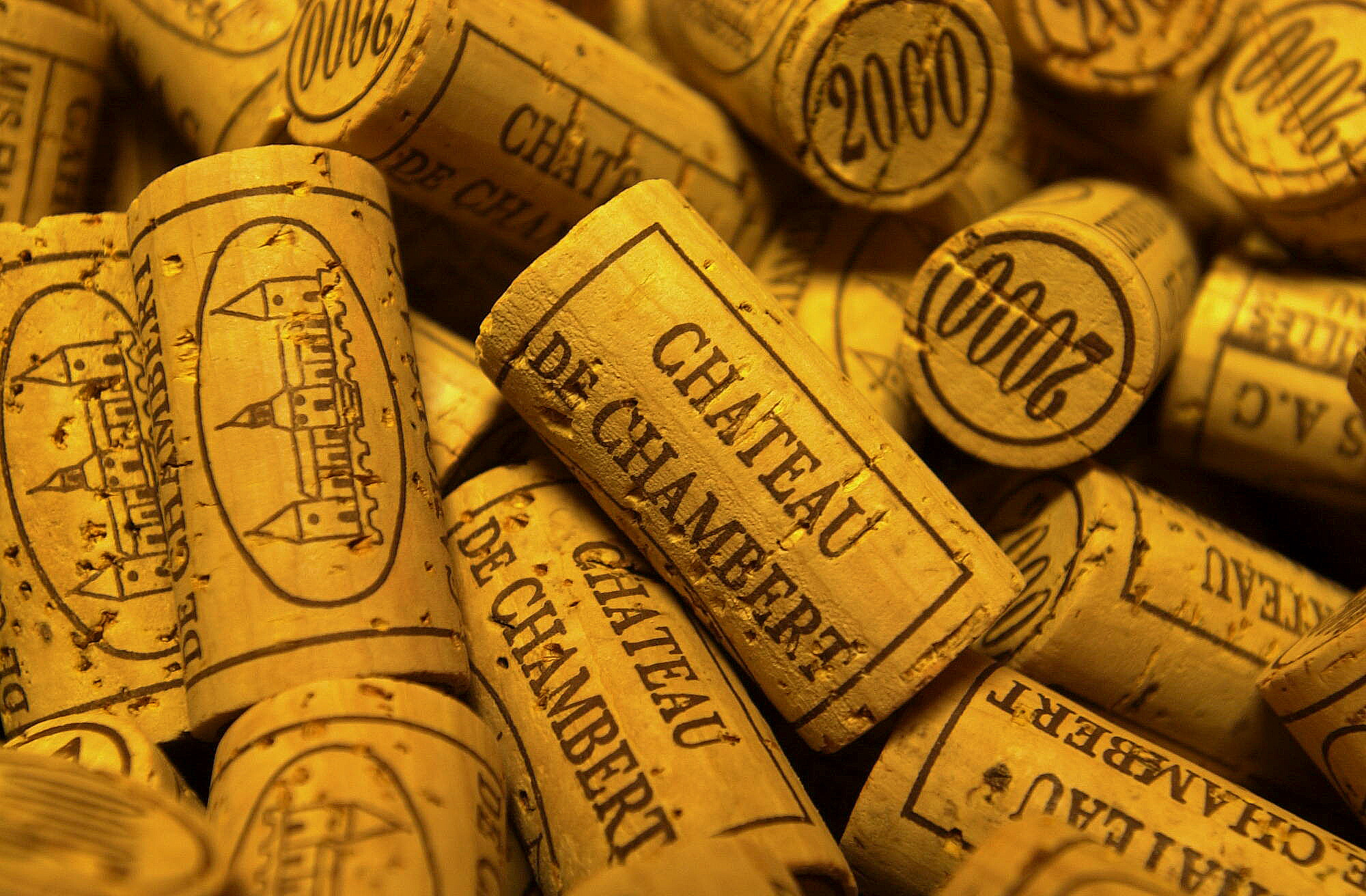 bouchons de liège de bouteille de Château de Chambert 2000, Malbec, Cahors - France